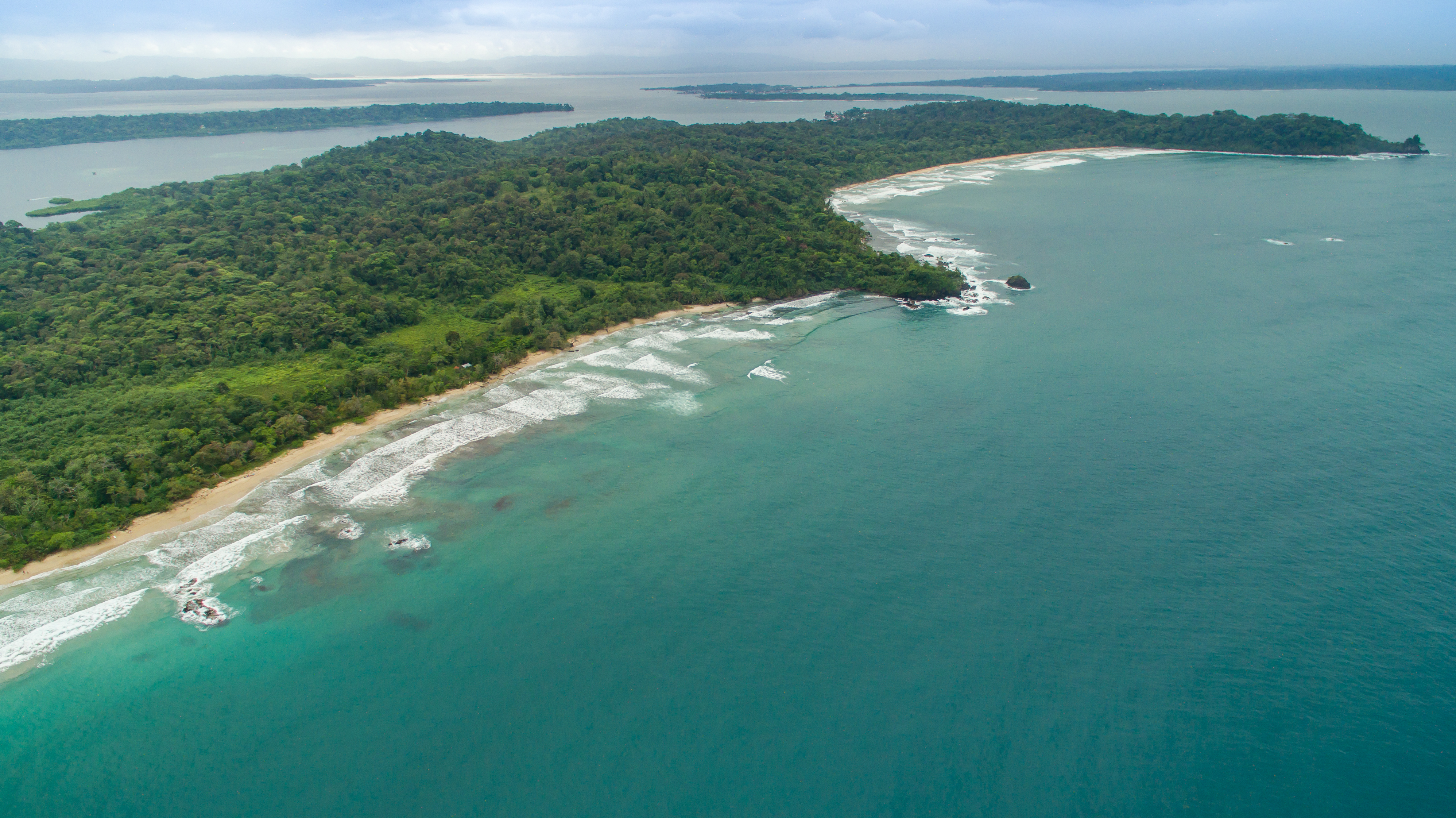 Der Red Frog Beach ist Teil des Isla Bastimentos National Marine Park.